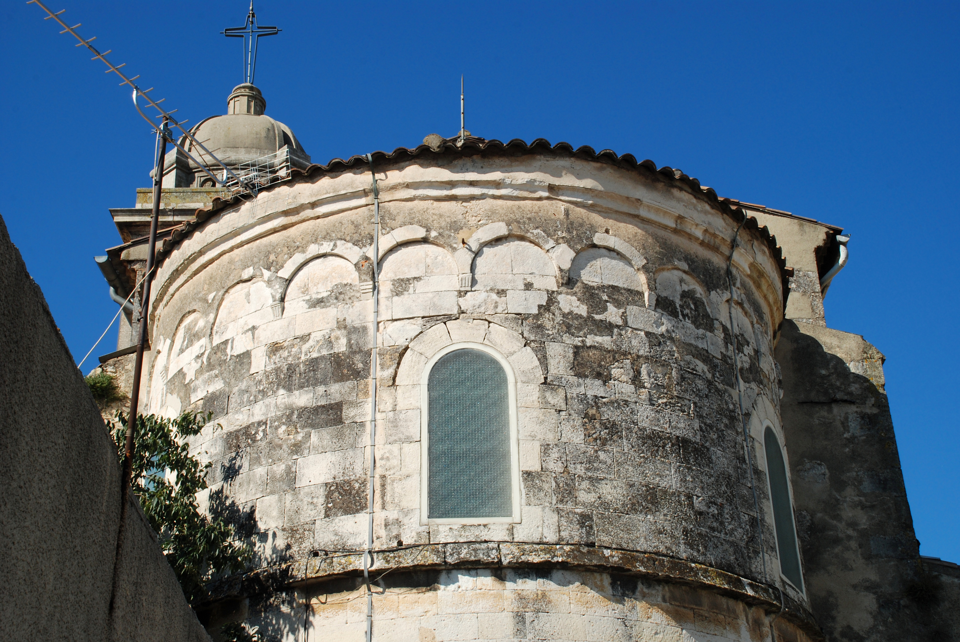 France - Gard - Église de Saint-Césaire-lès-Nîmes